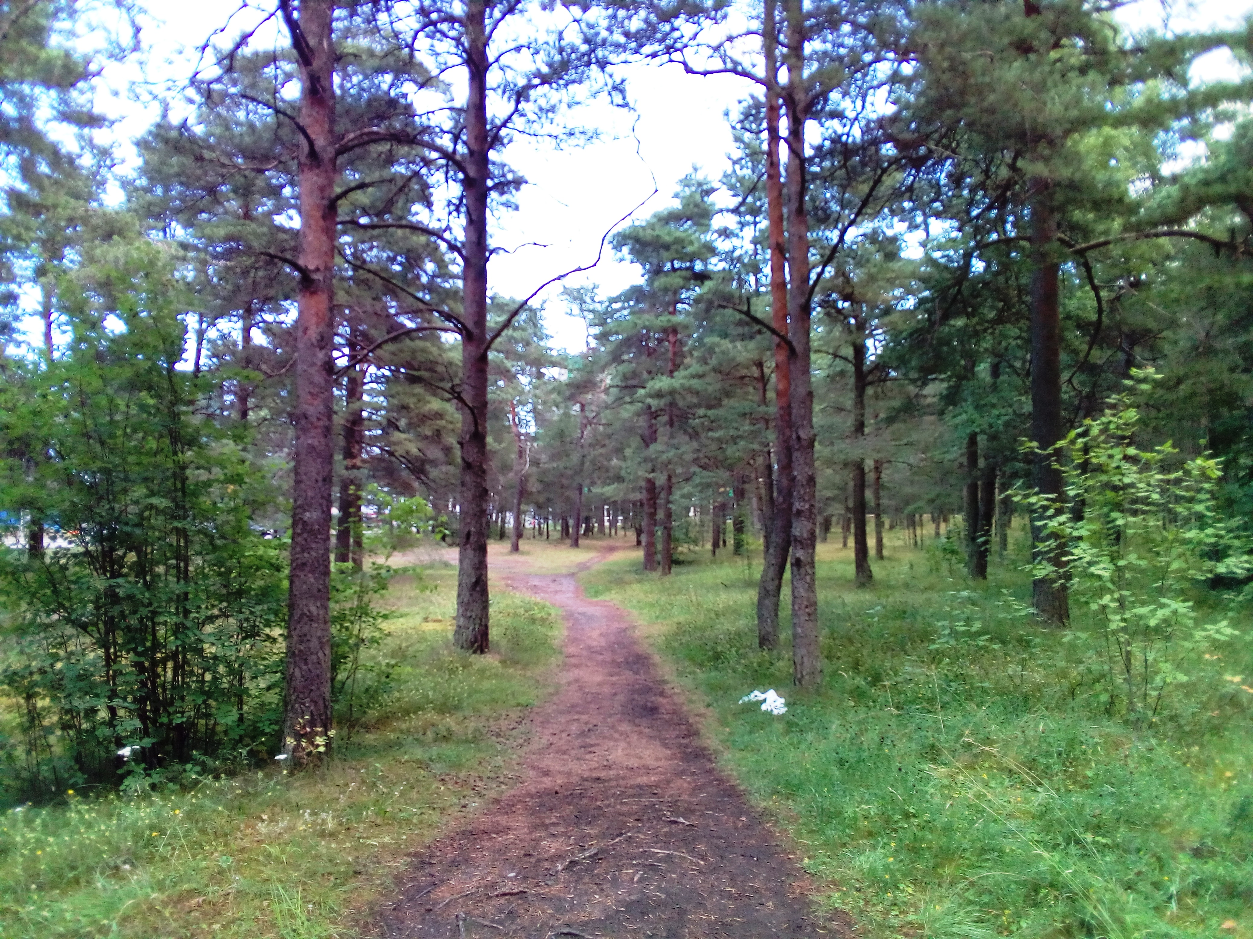 Järve mets